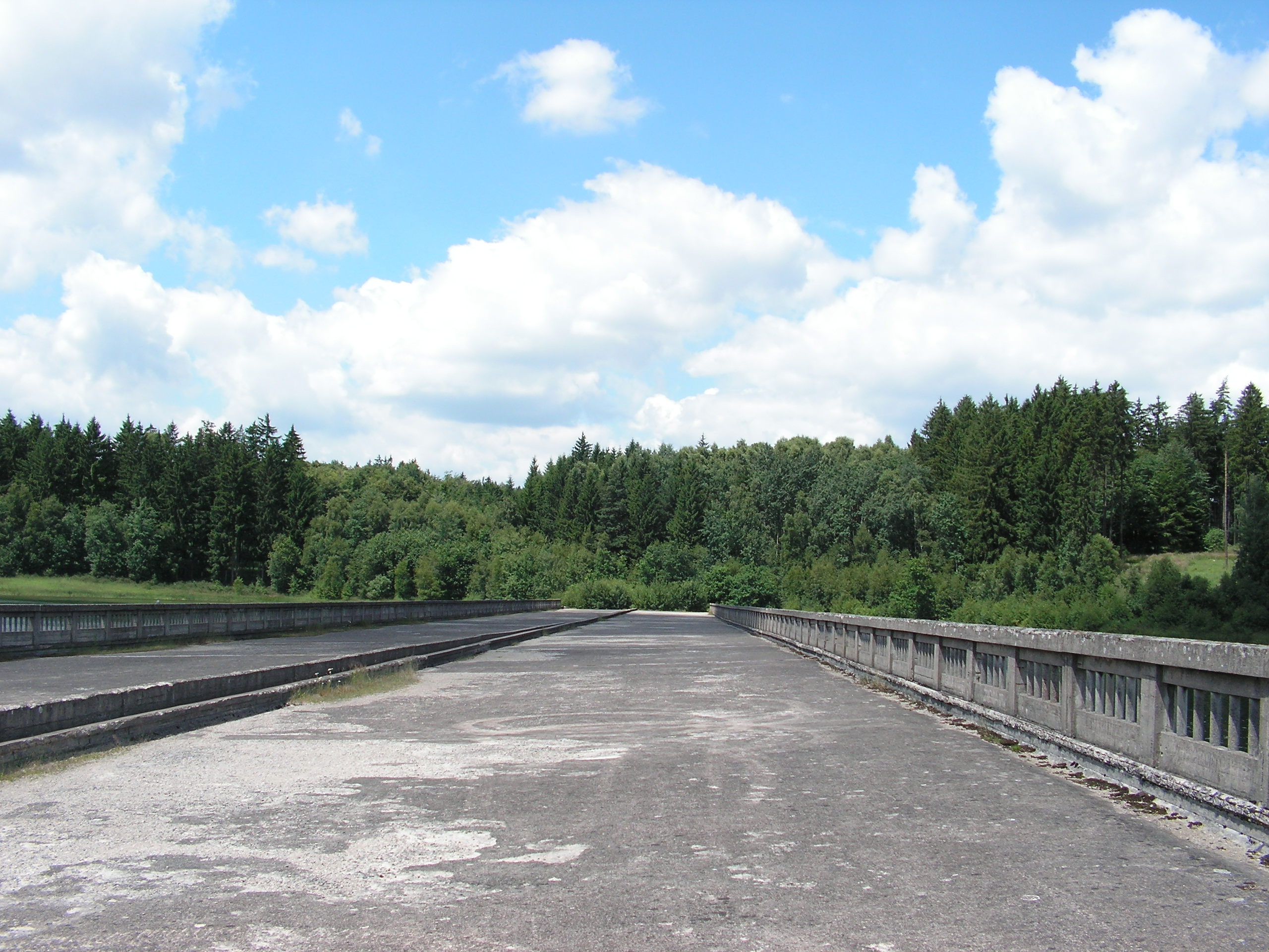 Starý nedokončený dálniční most přes zatopené údolí Sedlického potoka u Borovska.